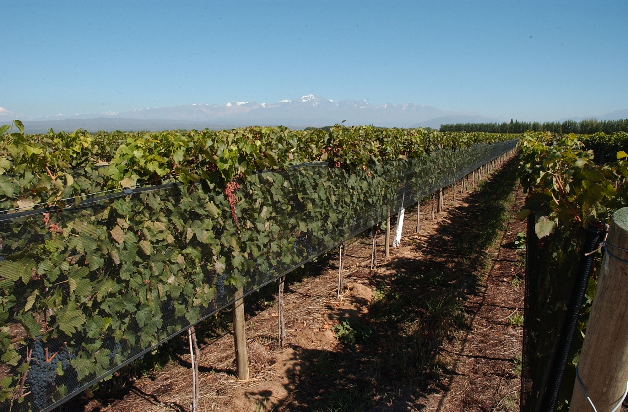 Plantacion de Bodega Chakana en Agrelo, Lujan de Cuyo, Mendoza.